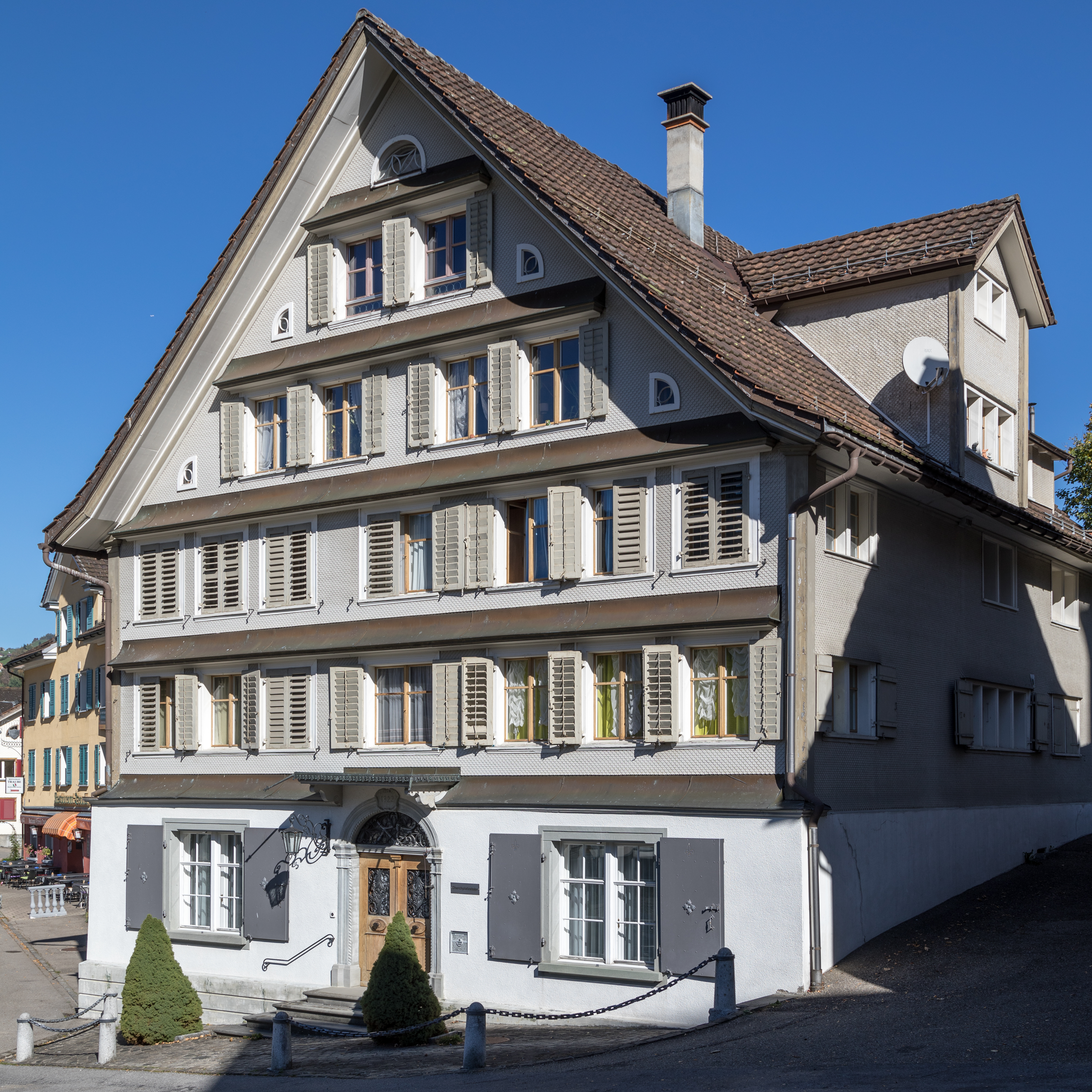 "Cherchplatzstobe" neben der Ev.-ref. Kirche in Nesslau, Kanton St. Gallen.